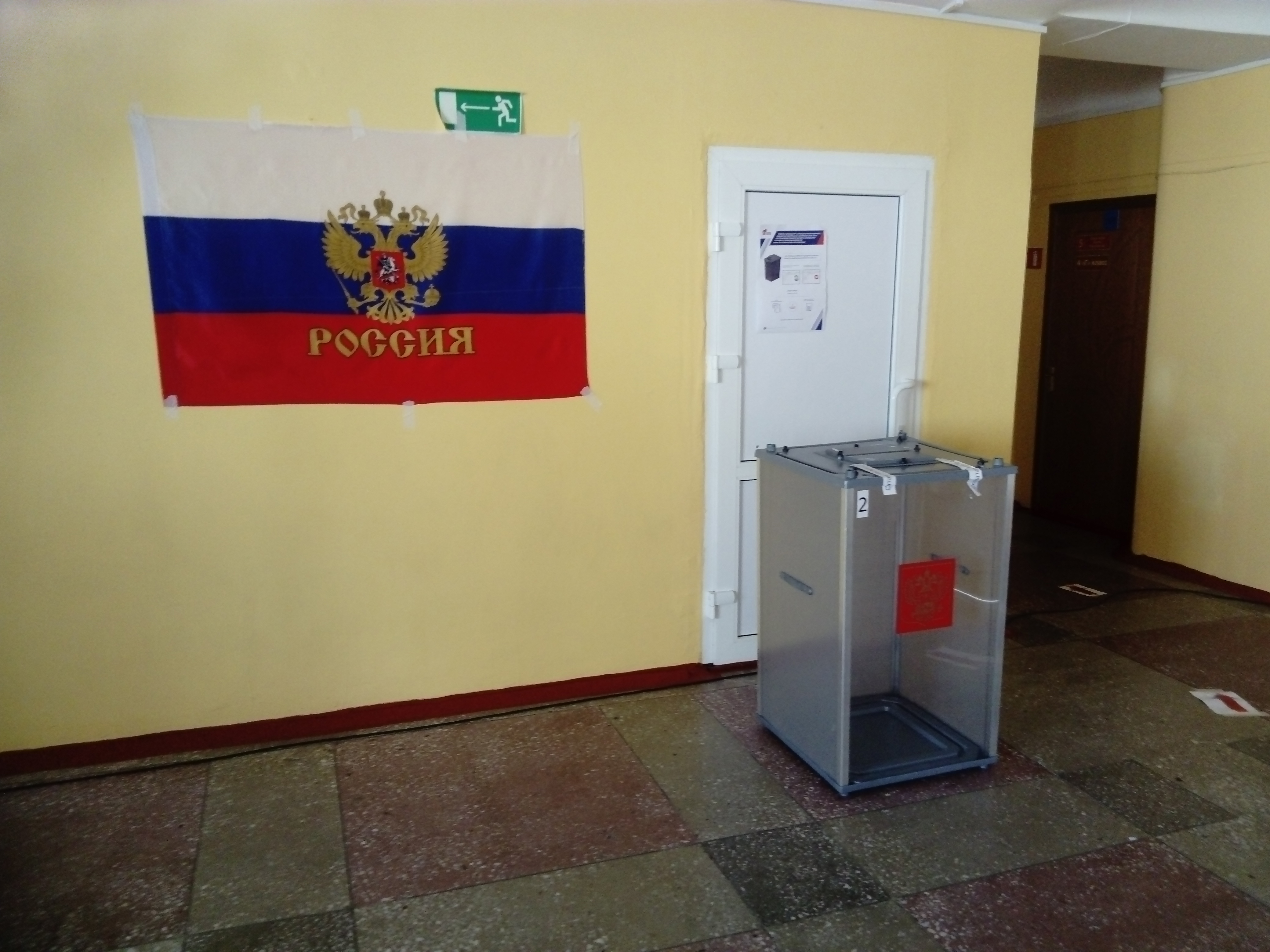 Общероссийское голосование (досрочное) по поправкам к Конституции. Петропавловск-Камчатский, Россия. Избирательный участок № 41 (школа № 40). 25 июня 2020